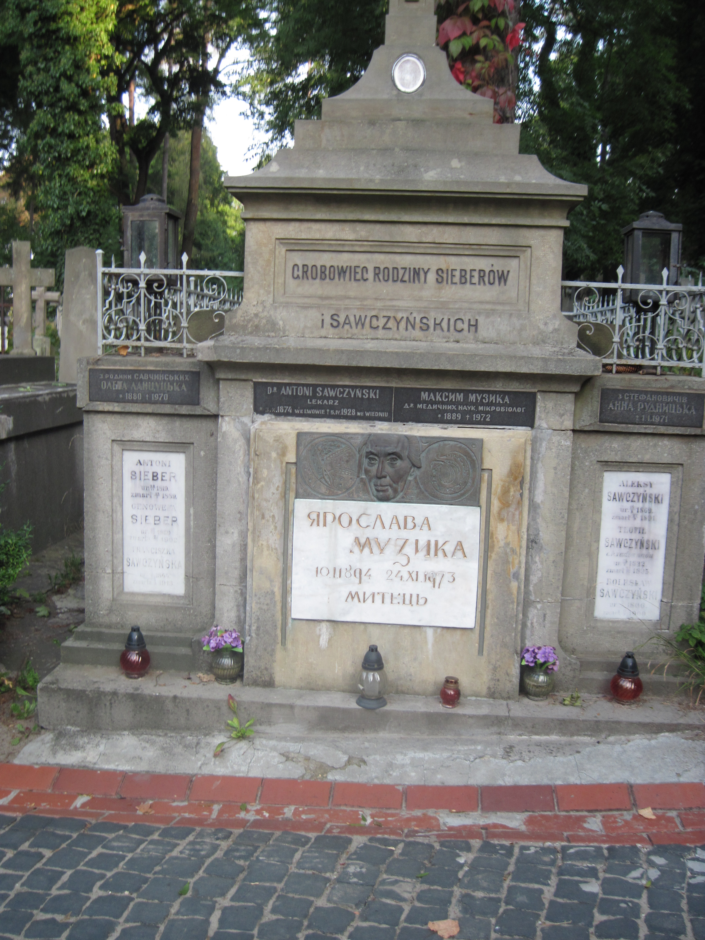 Гробівець Савчинських, Музик, Зіберів, Личаків